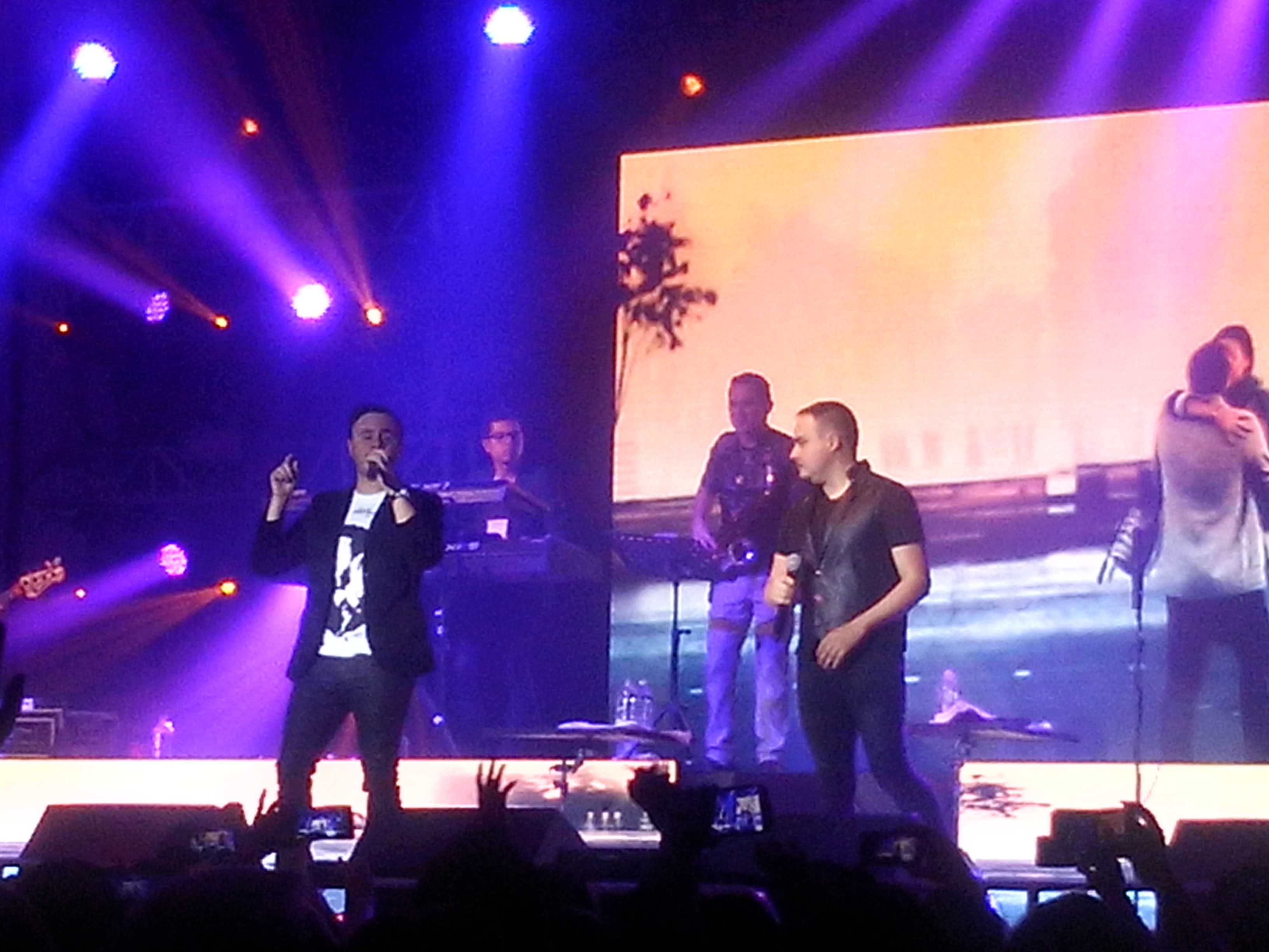 Río Roma en vivo presentándose en el Hotel Posada de Tampico en Tampico, Tamaulipas el 5 de Marzo del 2016.